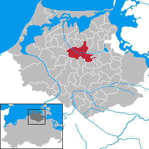 Velgast in Mecklenburg-Vorpommern - District Nordvorpommern